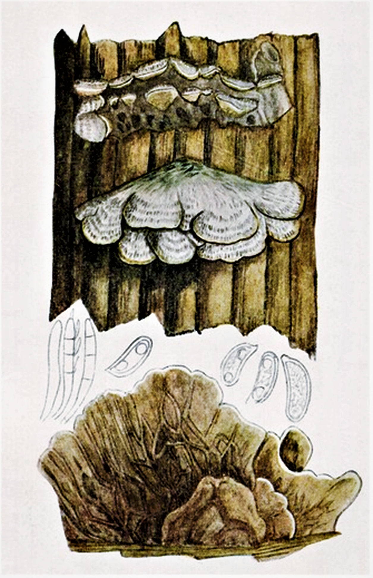 Giacomo Bresadola: Auricularia mesenterica (Dicks., 1785) Pers. (1822)